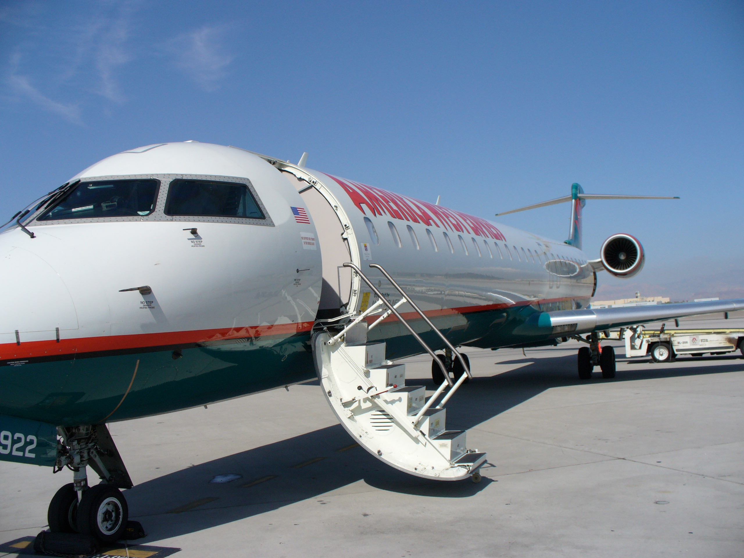 Mesa Airlines Bombardier Canadair Regional Jet 900LR